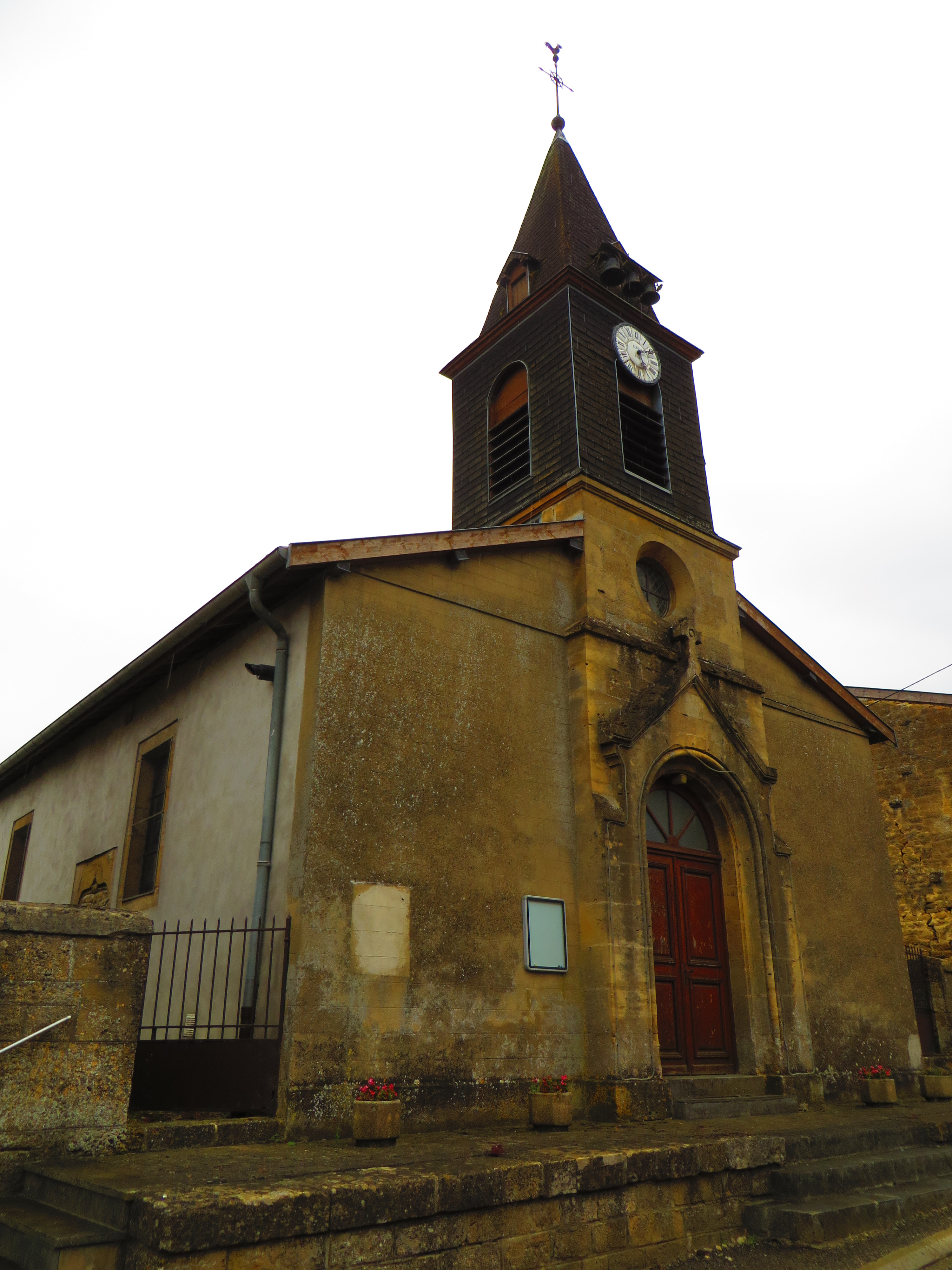 Han-lès-Juvigny L'église Saint-Jean-L'Évangéliste